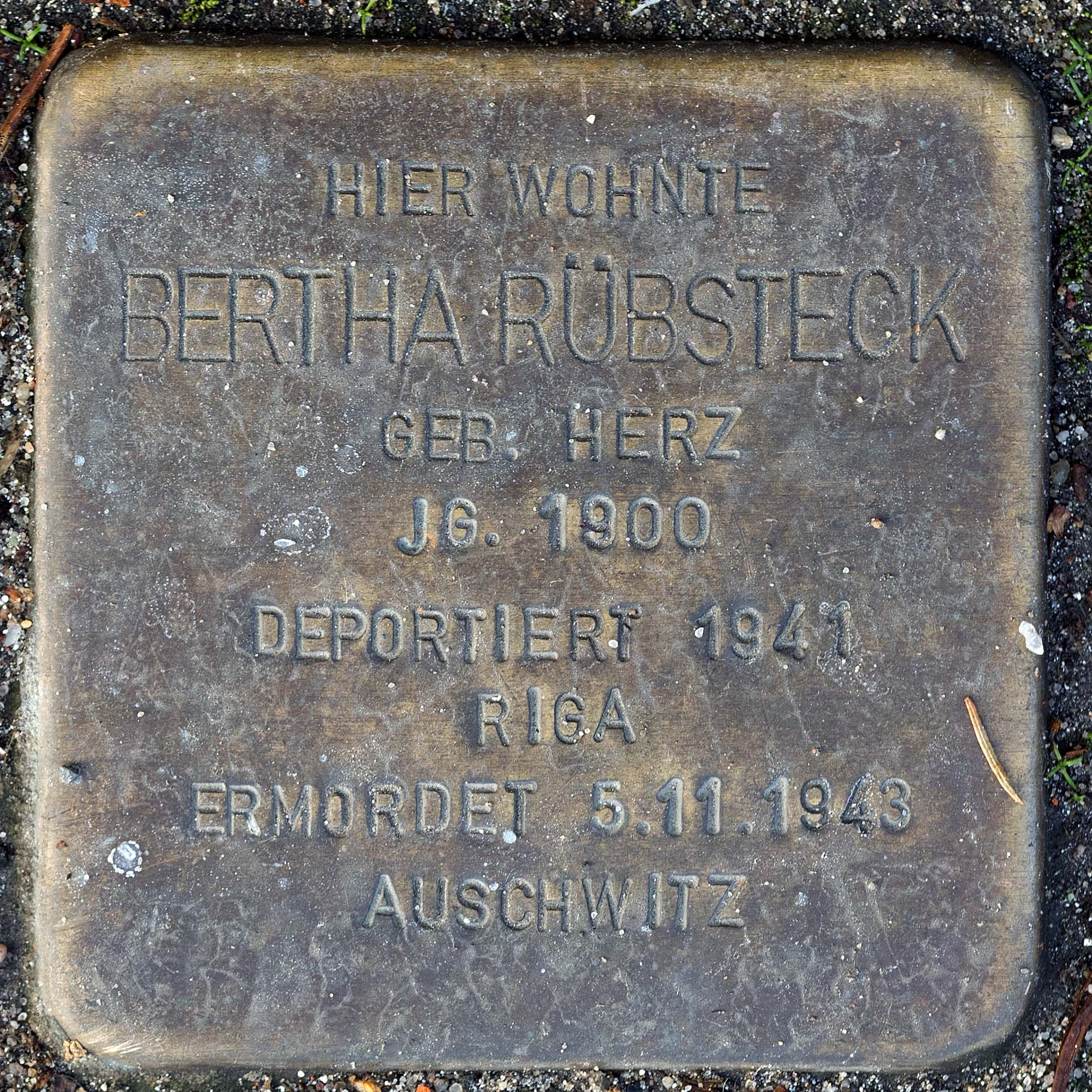 Stolperstein für Ruebsteck Berta